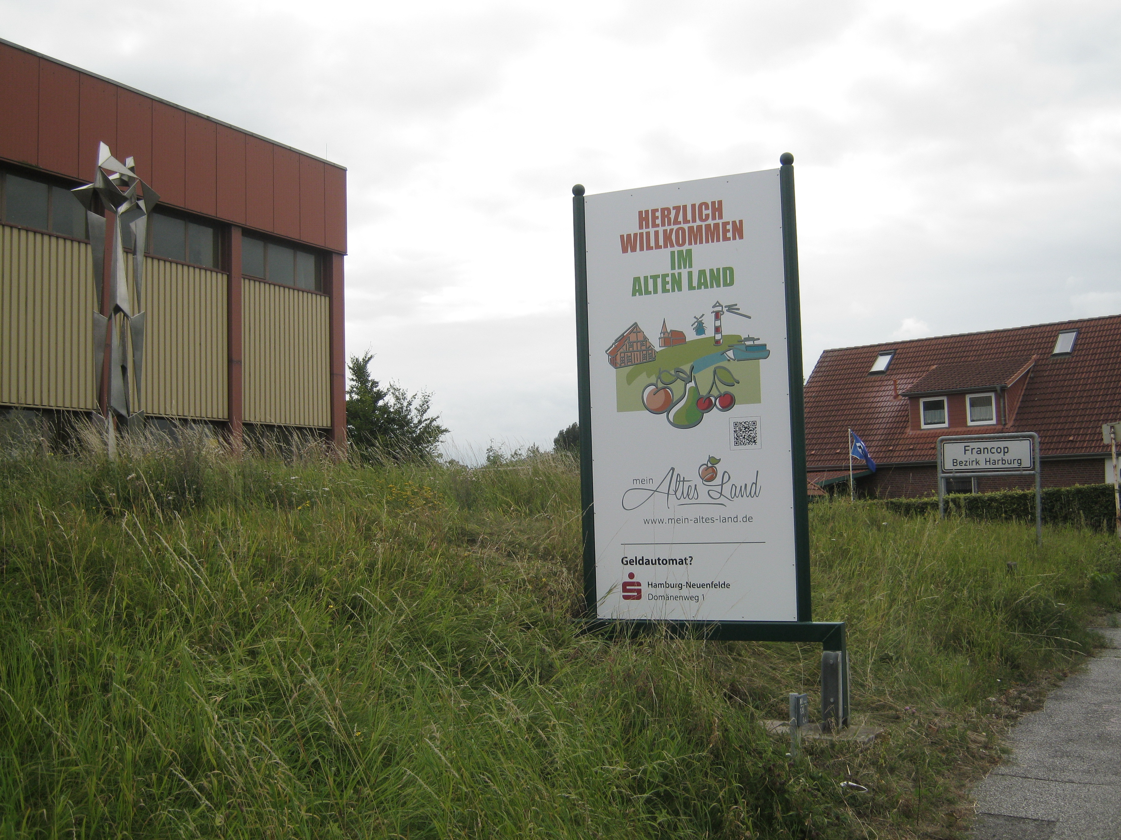 Schilder an der Grenze zwischen den hamburger Stadtteilen Moorburg und Francop.